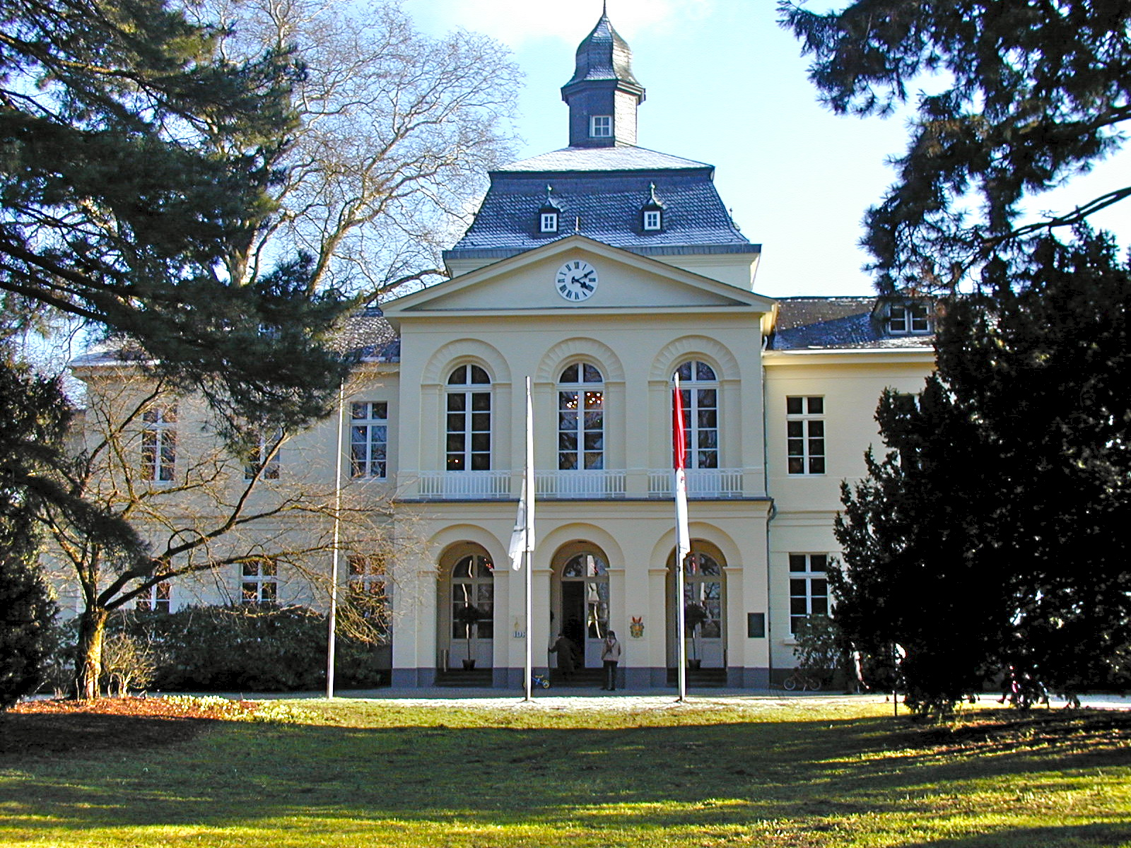 Schloss Eller in Düsseldorf, Tag der offenen Tür nach Sanierung und Wiedereröffnung